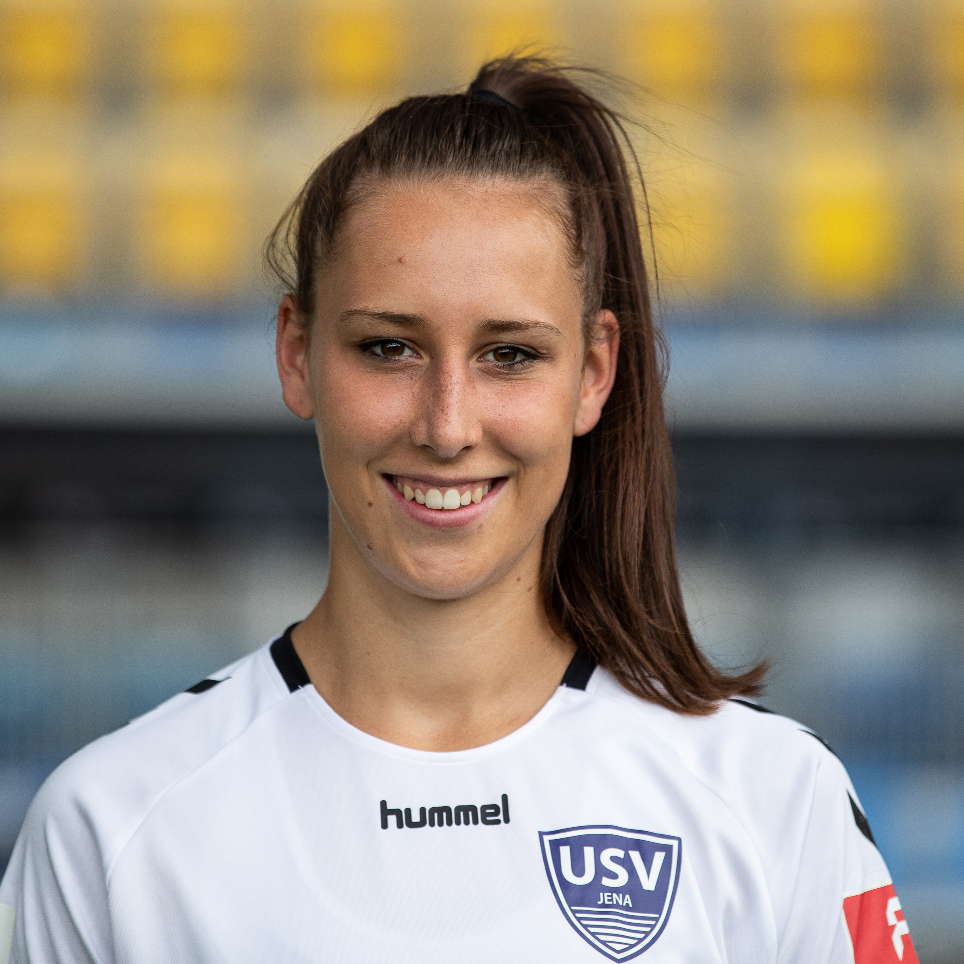 Fußball, Flyeralarm Frauen-Bundesliga, Mannschaftsfotos FF USV Jena; Anna Weiß (FF USV Jena, 21); Porträt, Einzelbild